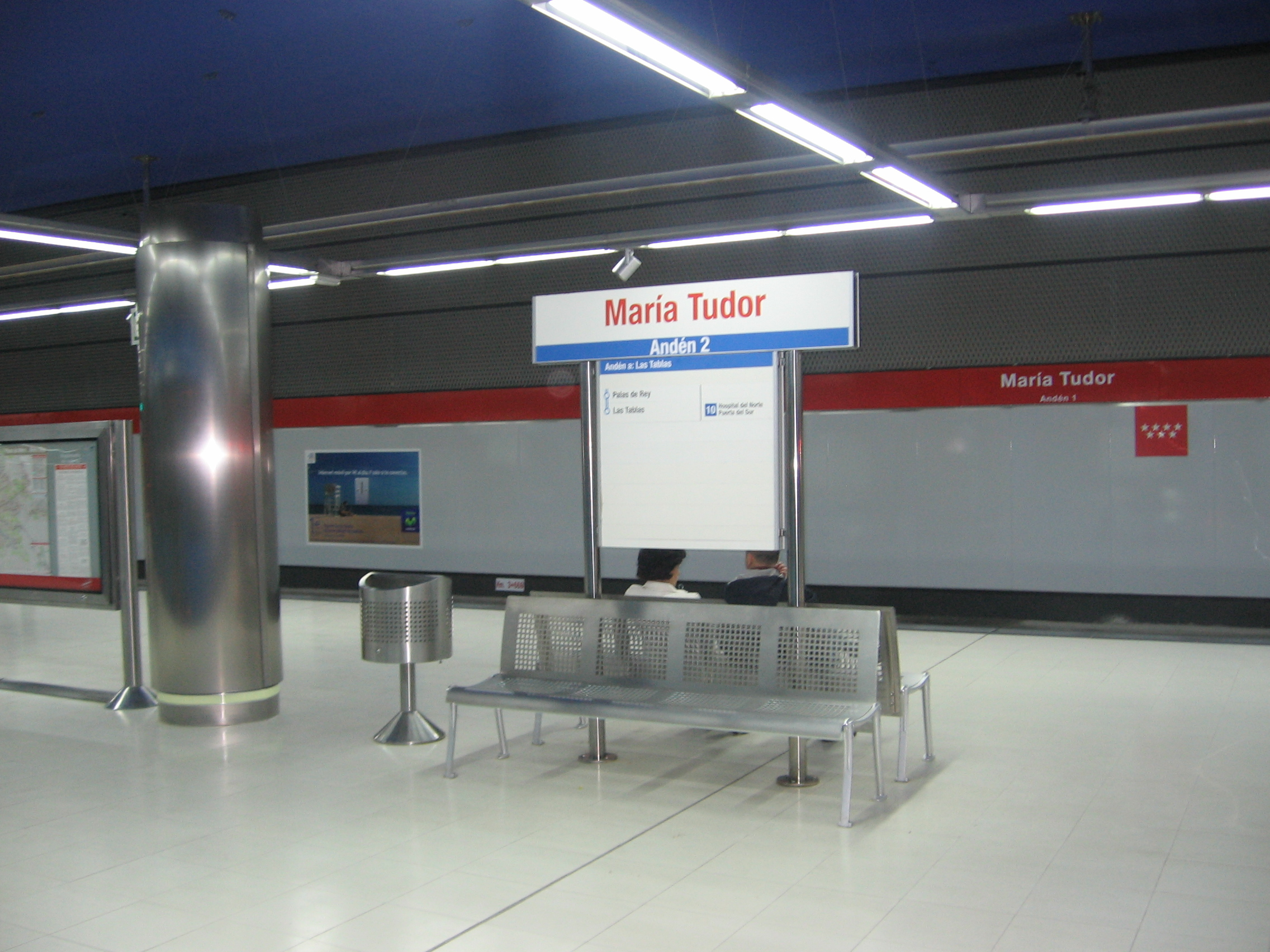 María Tudor station in Madrid's light rail. (Shown people are random people). Estación de María Tudor del Metro Ligero de Madrid. (La gente que aparece es casual).